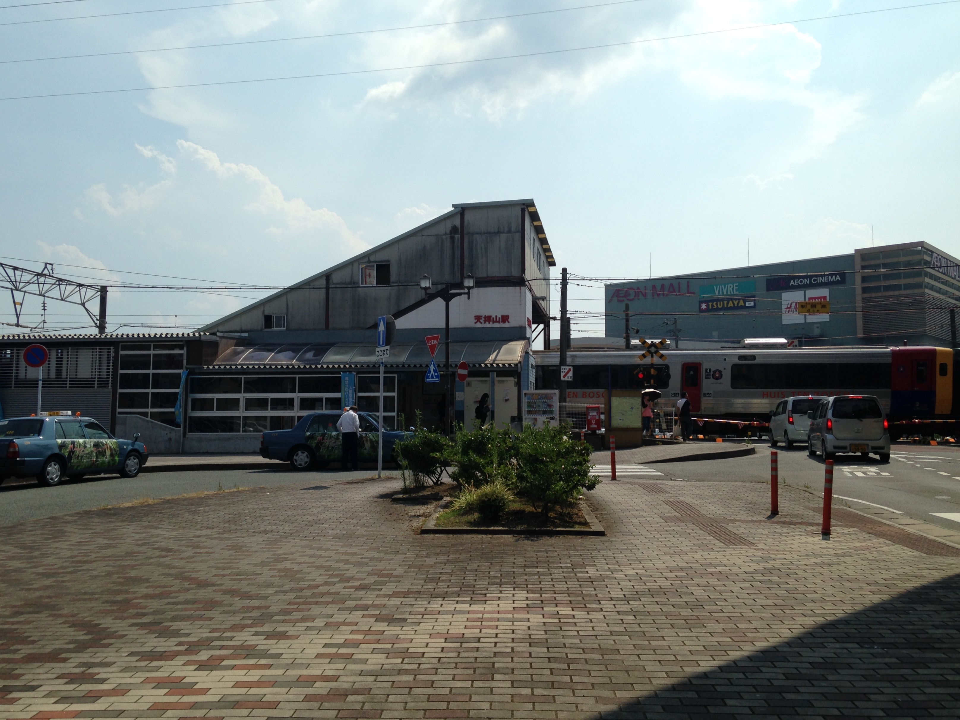 天拝山駅の遠景